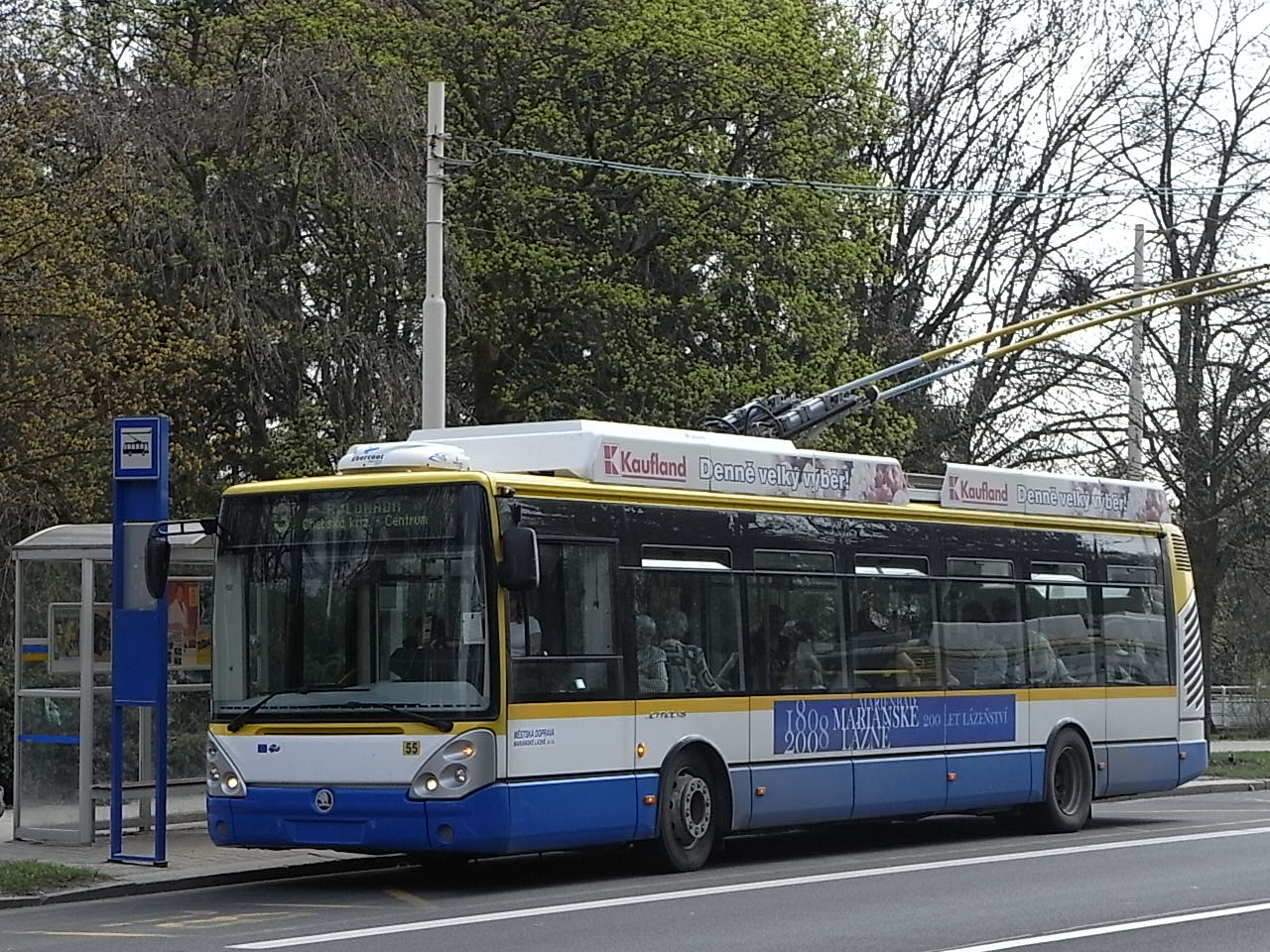 Mariánské Lázně, trolejbus na Hlavní třídě.